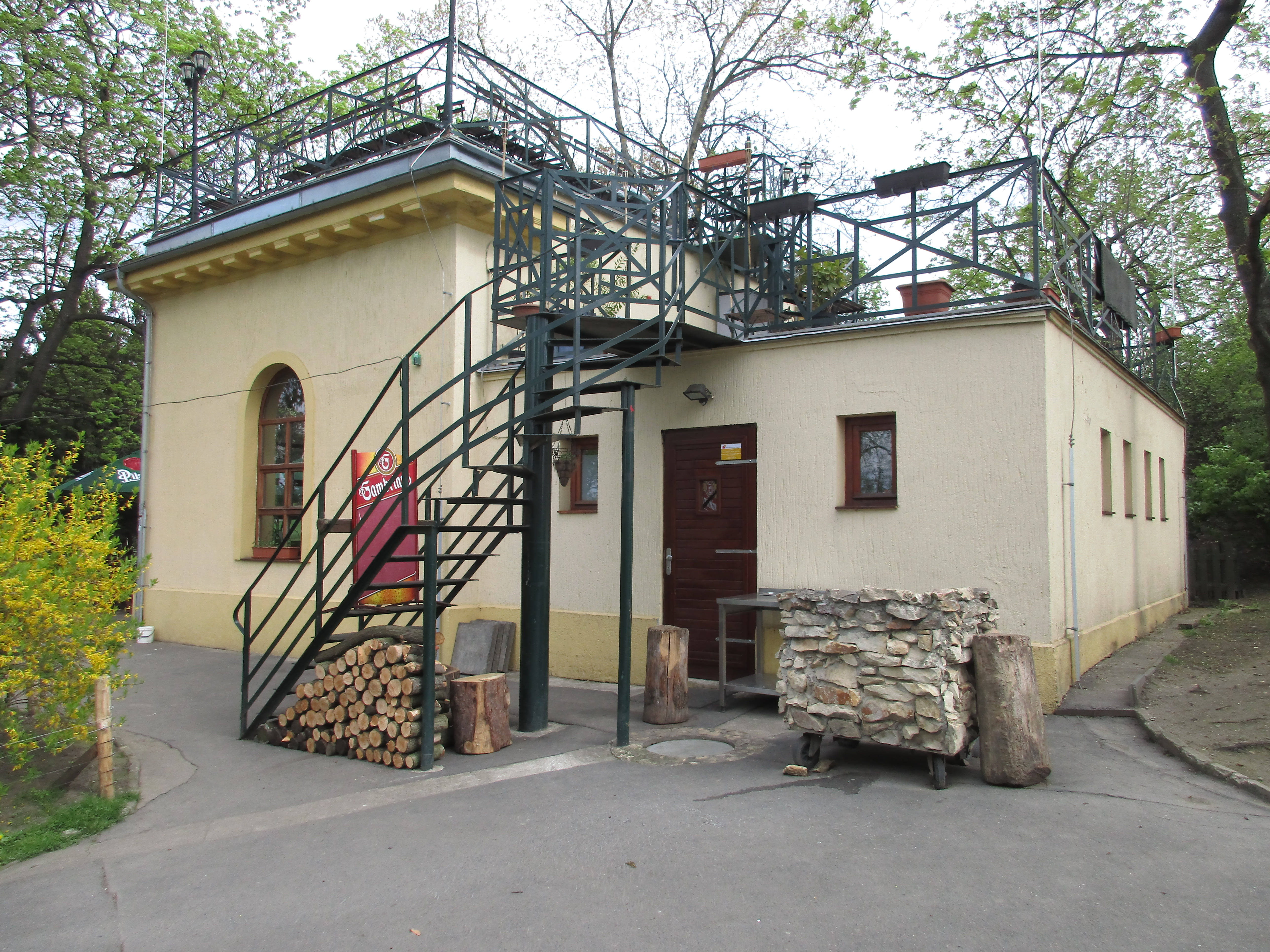 Původně gloriet v zahradě usedlosti Vozová, později restaurace a vyhlídkový pavilon Mlíkárna. Riegrovy sady.